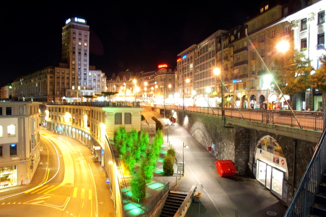 lausanne 1